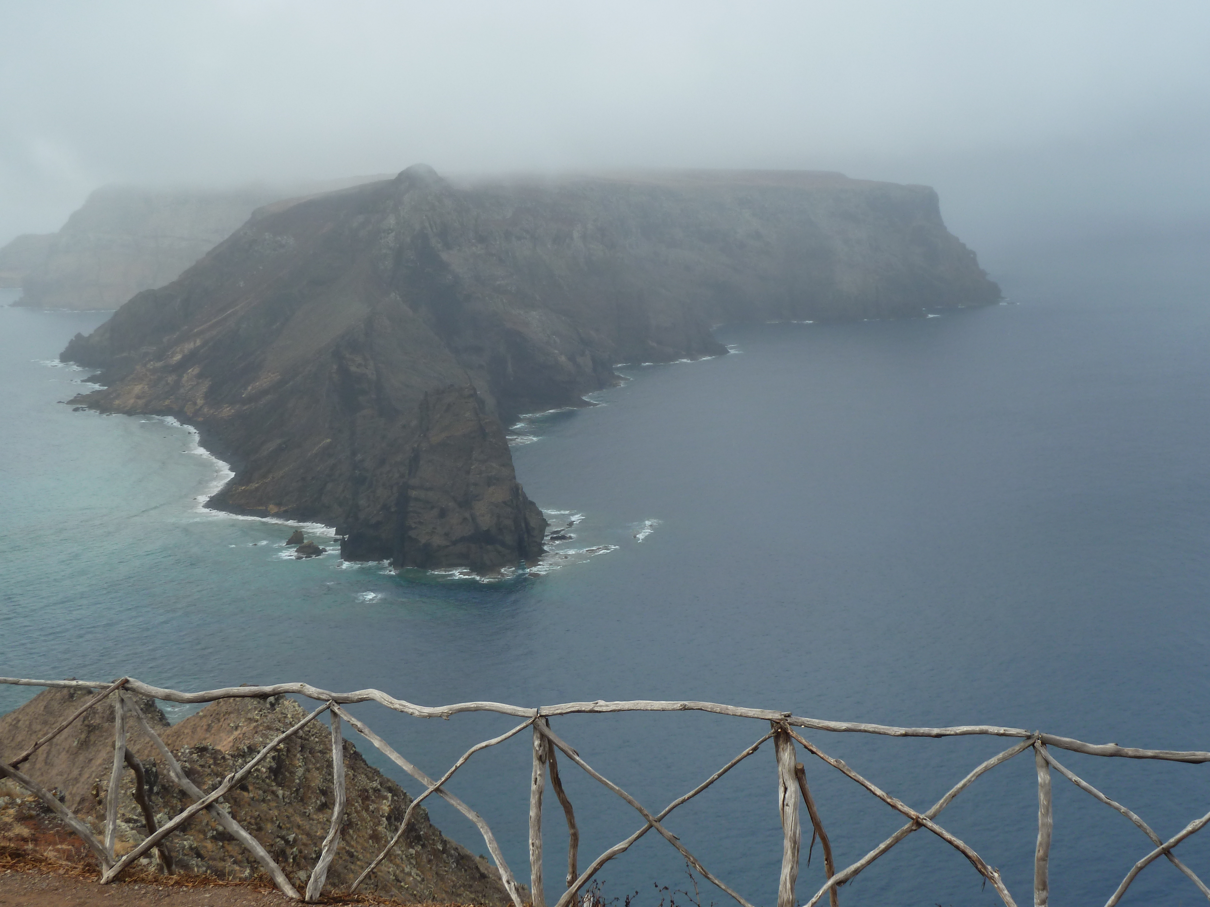 Ilha de Porto Santo, Madeira, Portugal